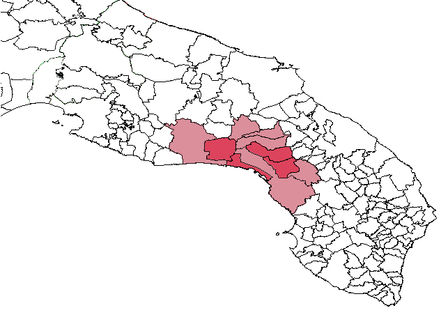 ho prelevato quest'immagine di pubblico domino [1] e ho messo le aree (quelle più scure sono da intendersi come feudo comunale completo)